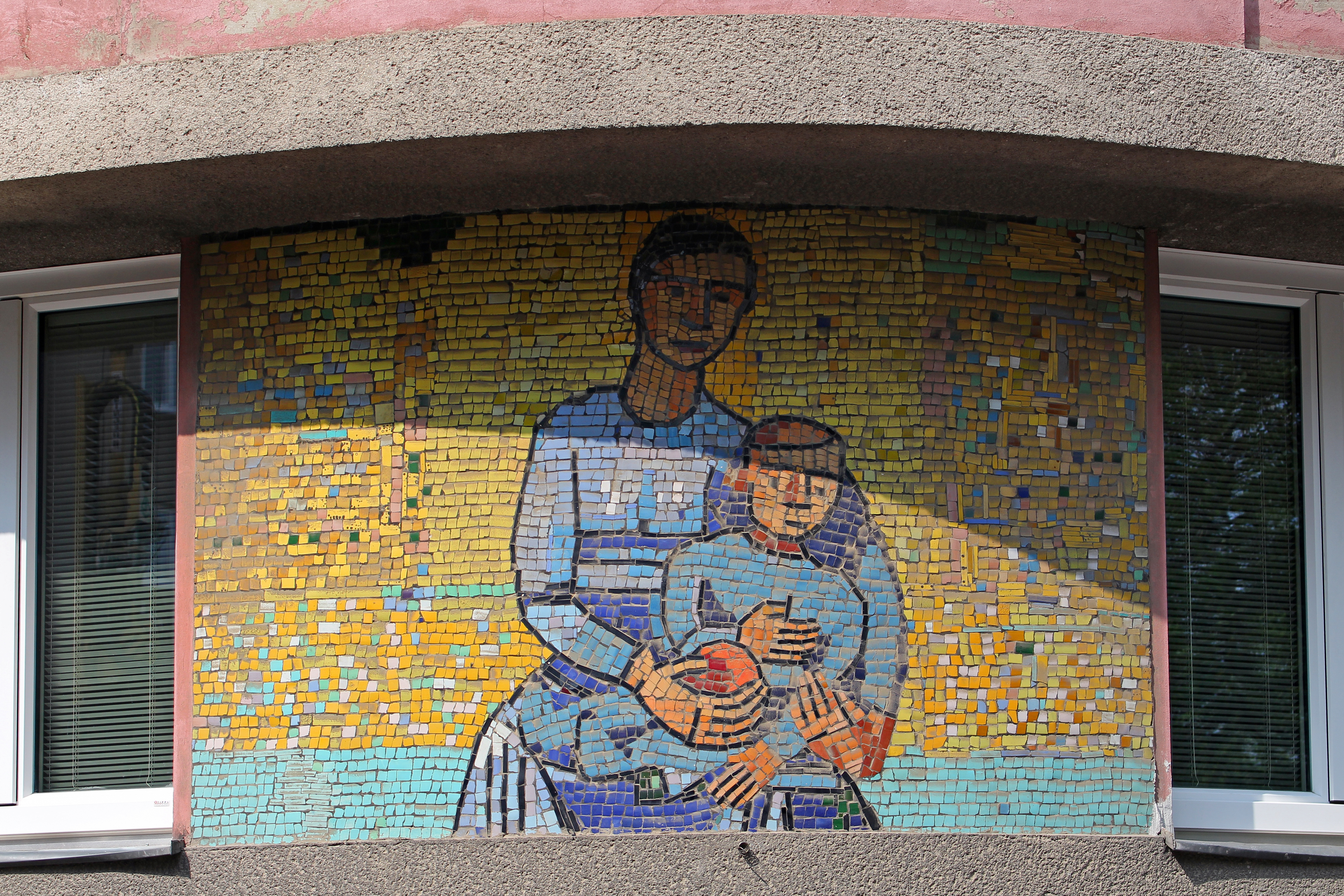 Das Mosaik "Mutter und Kind" von Leopold Birstinger, 1955-57, befindet sich am Gemeindebau Dreyhausenstraße 46 in Wien-Penzing.